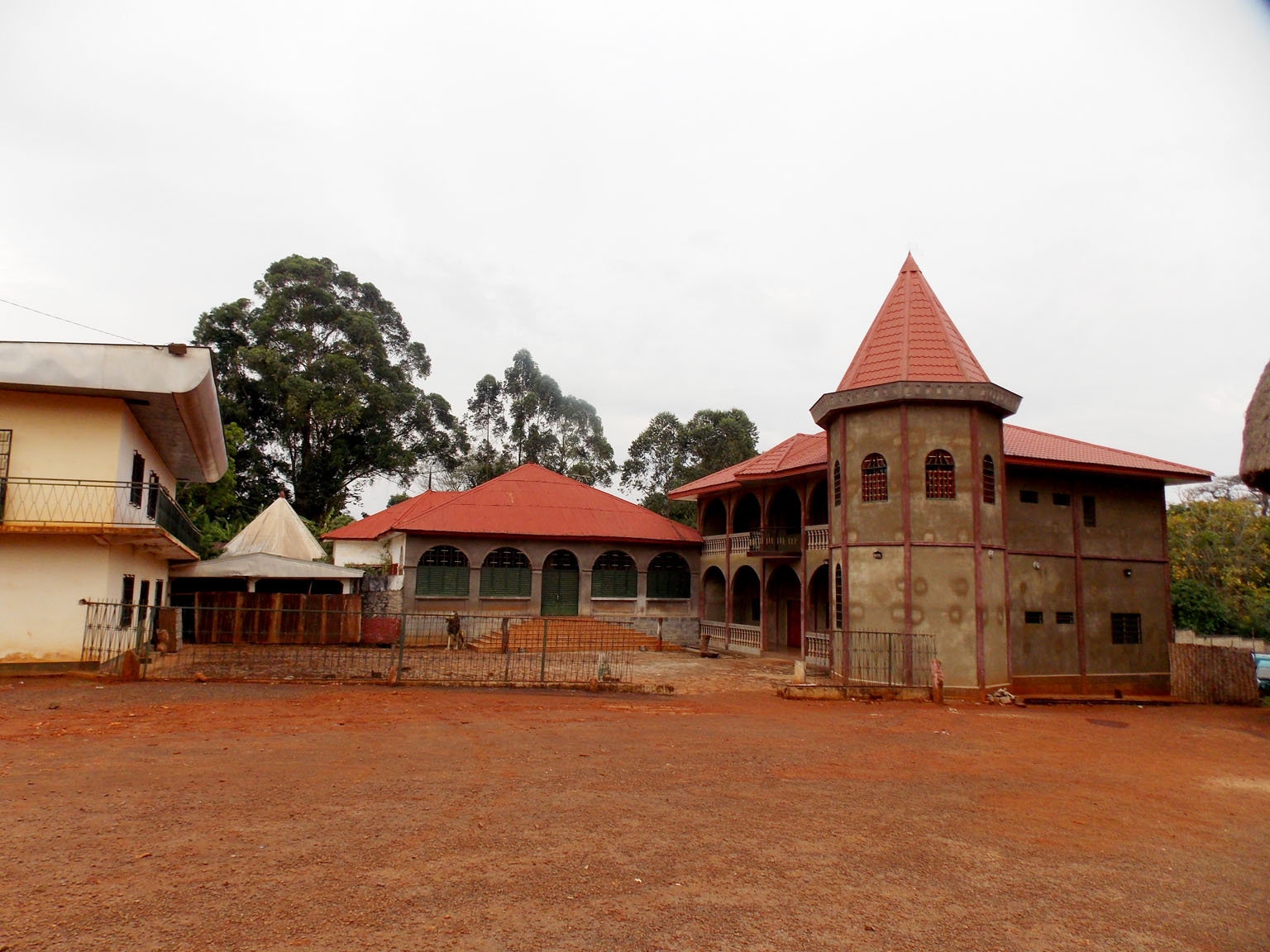 La résidence (Renovée) de l'ancien roi Nie KAMGA Joseph avant dernier chef Bandjoun